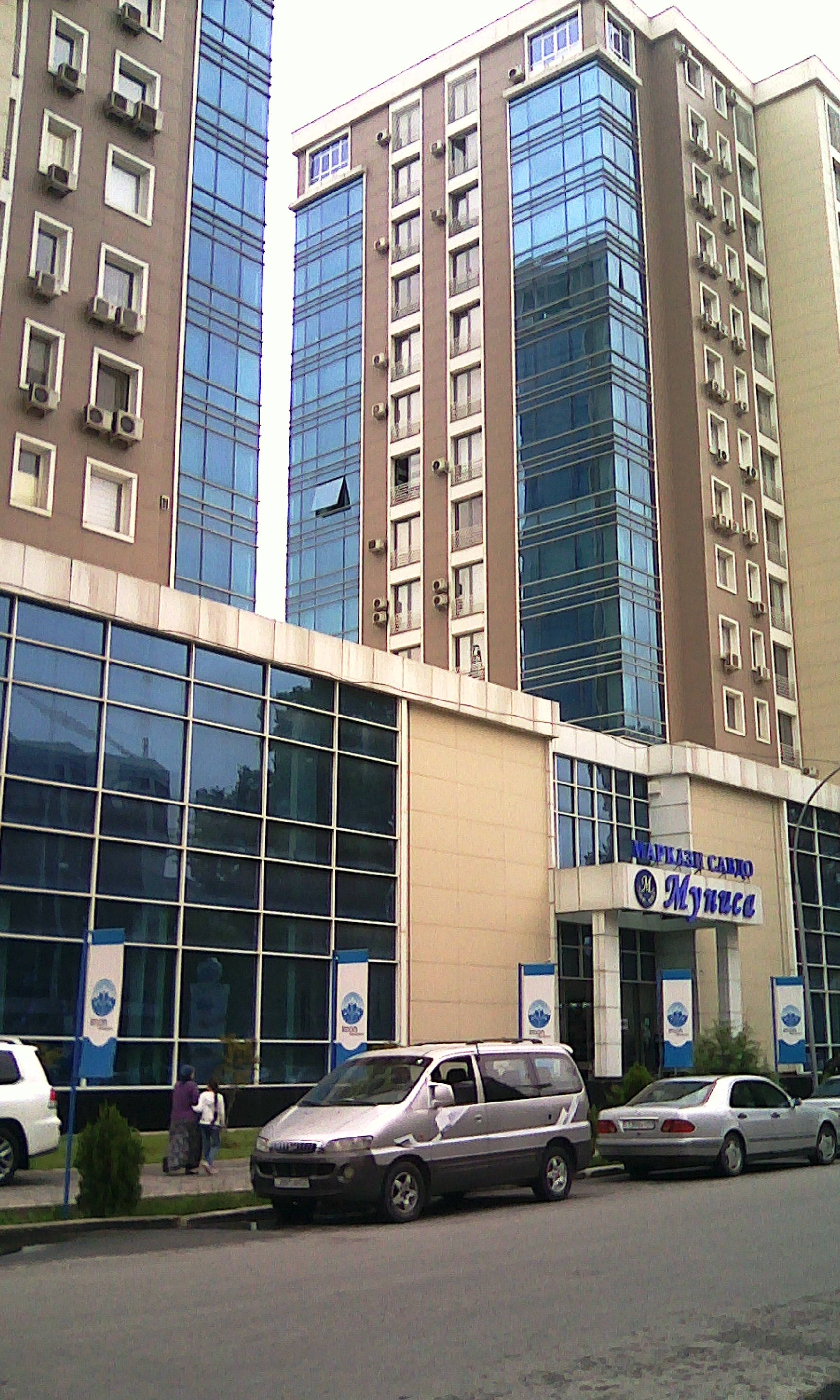 Тоҷикӣ: Бинои серошёна дар ш. Душанбе